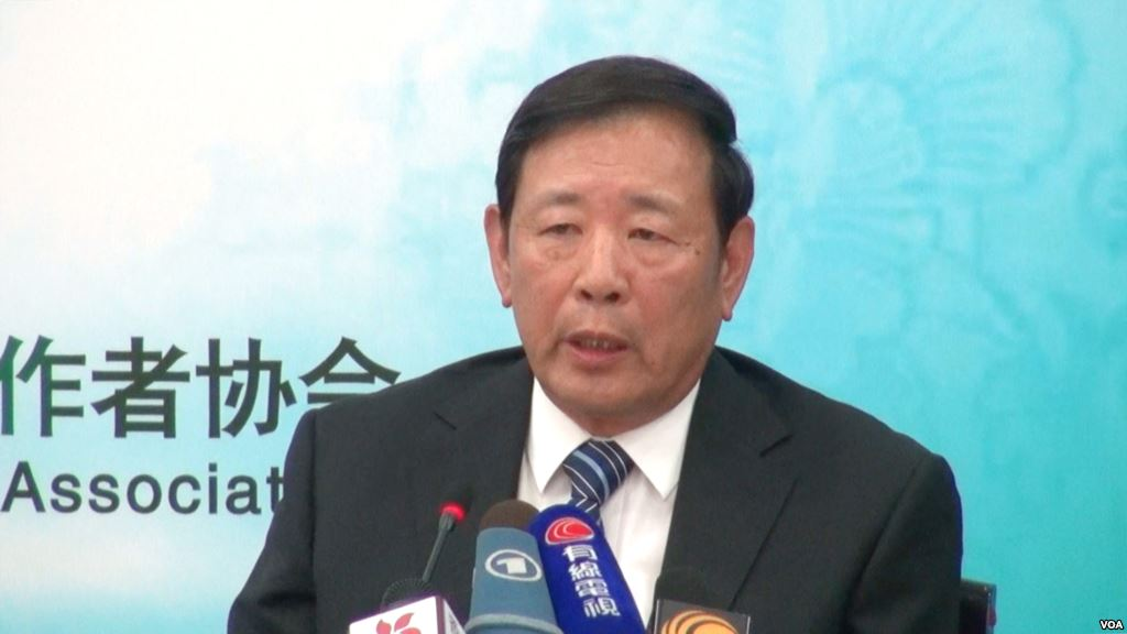 Luo Yuan